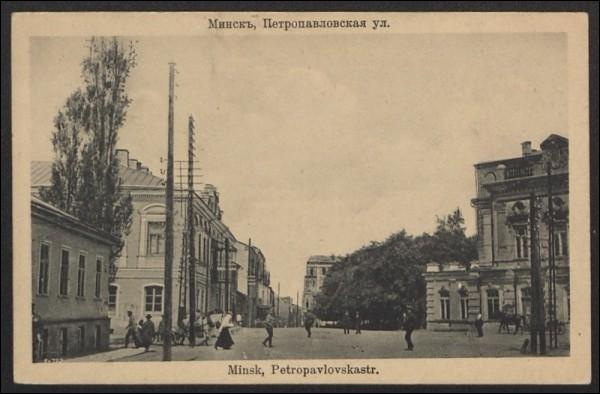 Перекрёсток К. Маркса и Энгельса